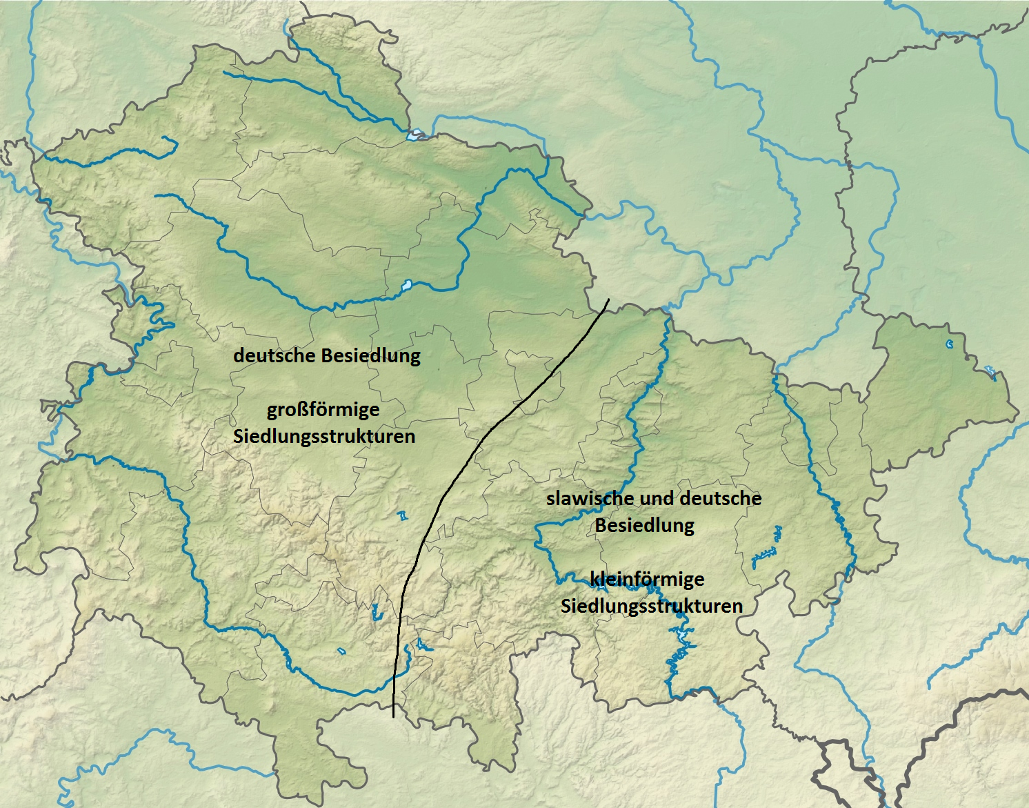 Ungefähre Abgrenzung slawischer und germanischer bzw. deutscher Siedlungsgebiete in Thüringen auf Grundlage der Ortsnamen und Siedlungsstrukturen.